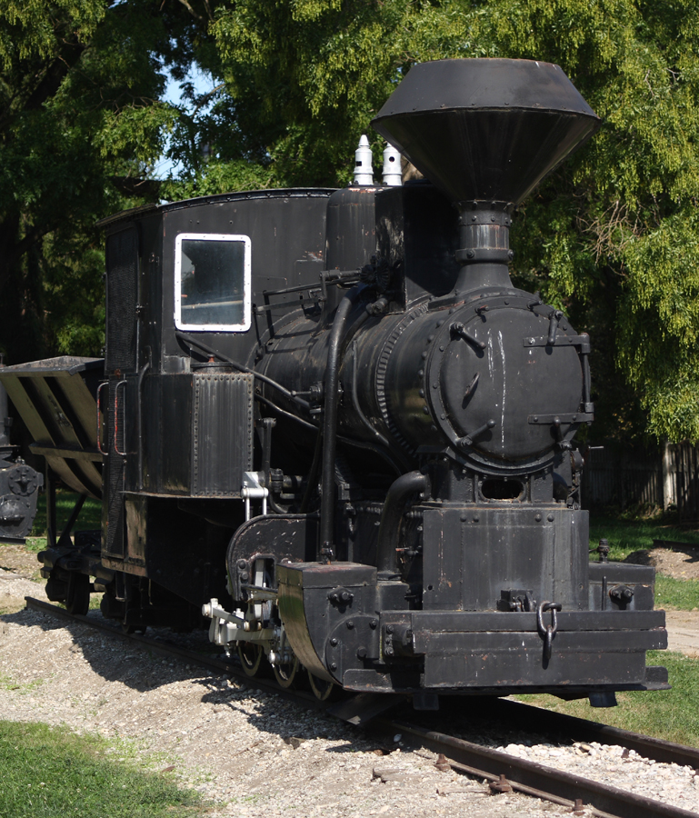 Kisvasúti mozdony a nagycenki kiállításon